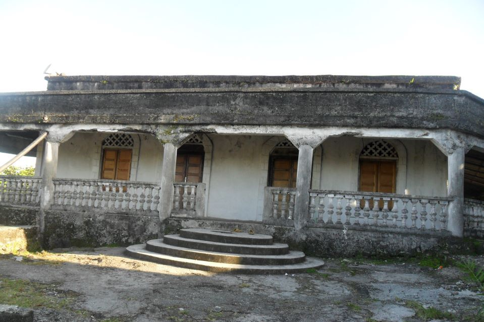 l'ancienne mosquée de chouani ( upload : Karim M. )